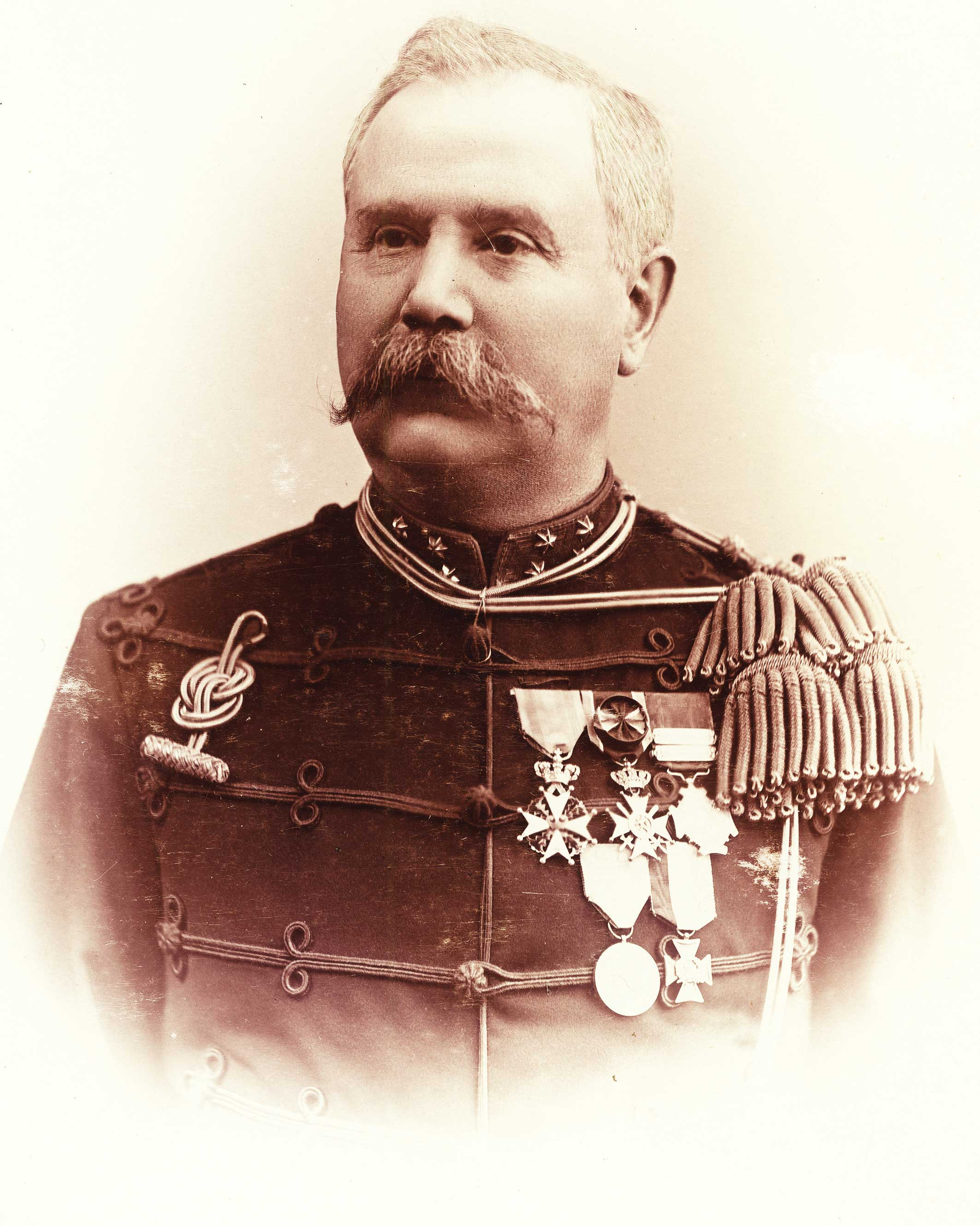 Generaal Borel